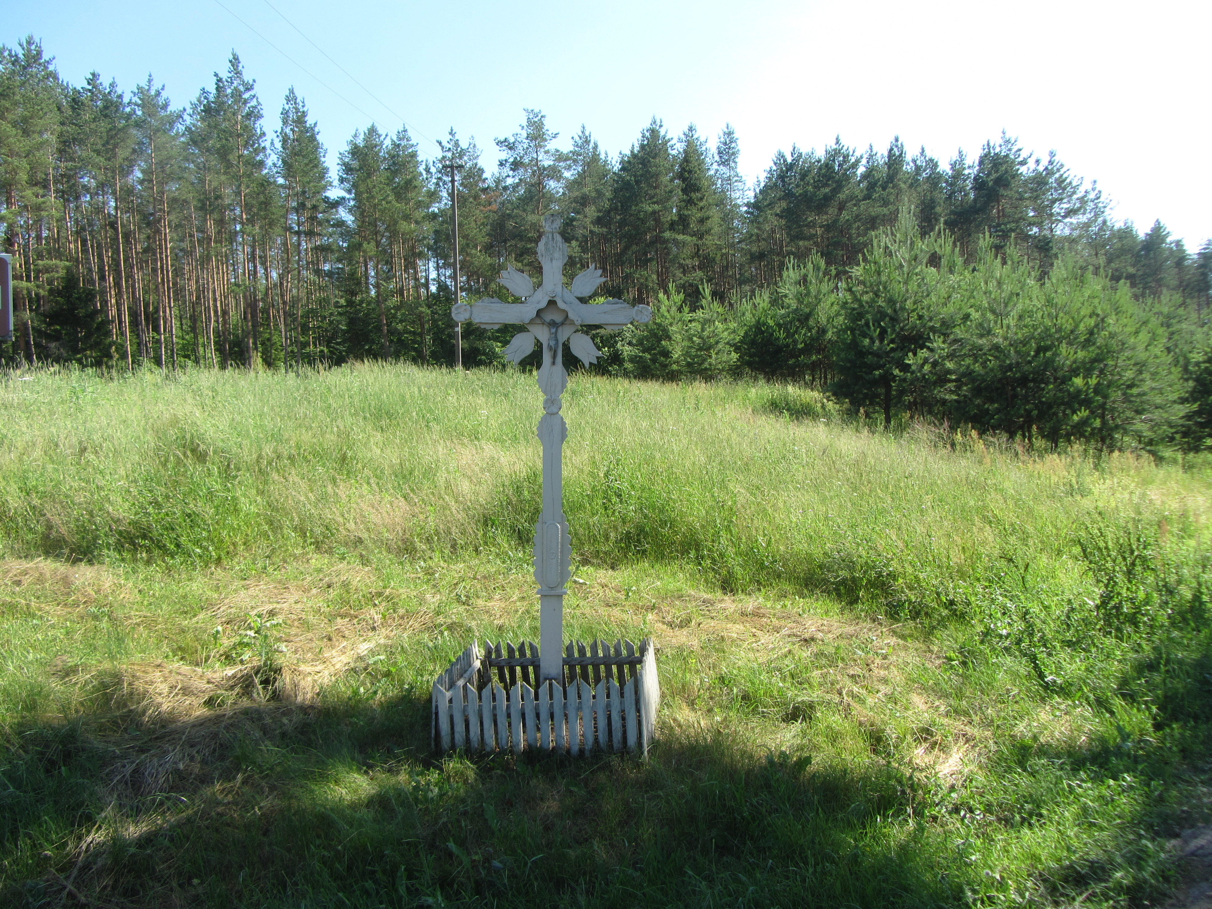 Nemunaičio sen., Lithuania